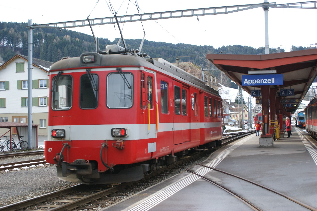 Triebwagen BDe 4/4 47 der Appenzeller Bahnen im Sturmeinsatz als Alleinfahrer in Appenzell. Reisende von und nach Wasserauen mussten in Appenzell umsteigen. Nachdem ein Steuer- (15t schwer) und ein Zwischenwagen (18t) von den Laseyer-Fallwinden in Wasserauen aus den Schienen gehoben wurden, wurde bei Sturmwarnung nur noch mit den alleinfahrenden Triebwagen 46 oder 47 von 1968 gefahren, deren Eigengewicht von 43t den Sturmwinden mehr Widerstand leisten konnte. Die Triebwagen 41 bis 45 waren für diesen Einsatz nicht geeignet, da sie nur einen Führerstand aufwiesen. Nach dem Rückzug der beiden Triebwagen 46 und 47 aus dem Personenverkehr werden Reisende von/nach Wasserauen bei Sturmwind auf der Strasse befördert.